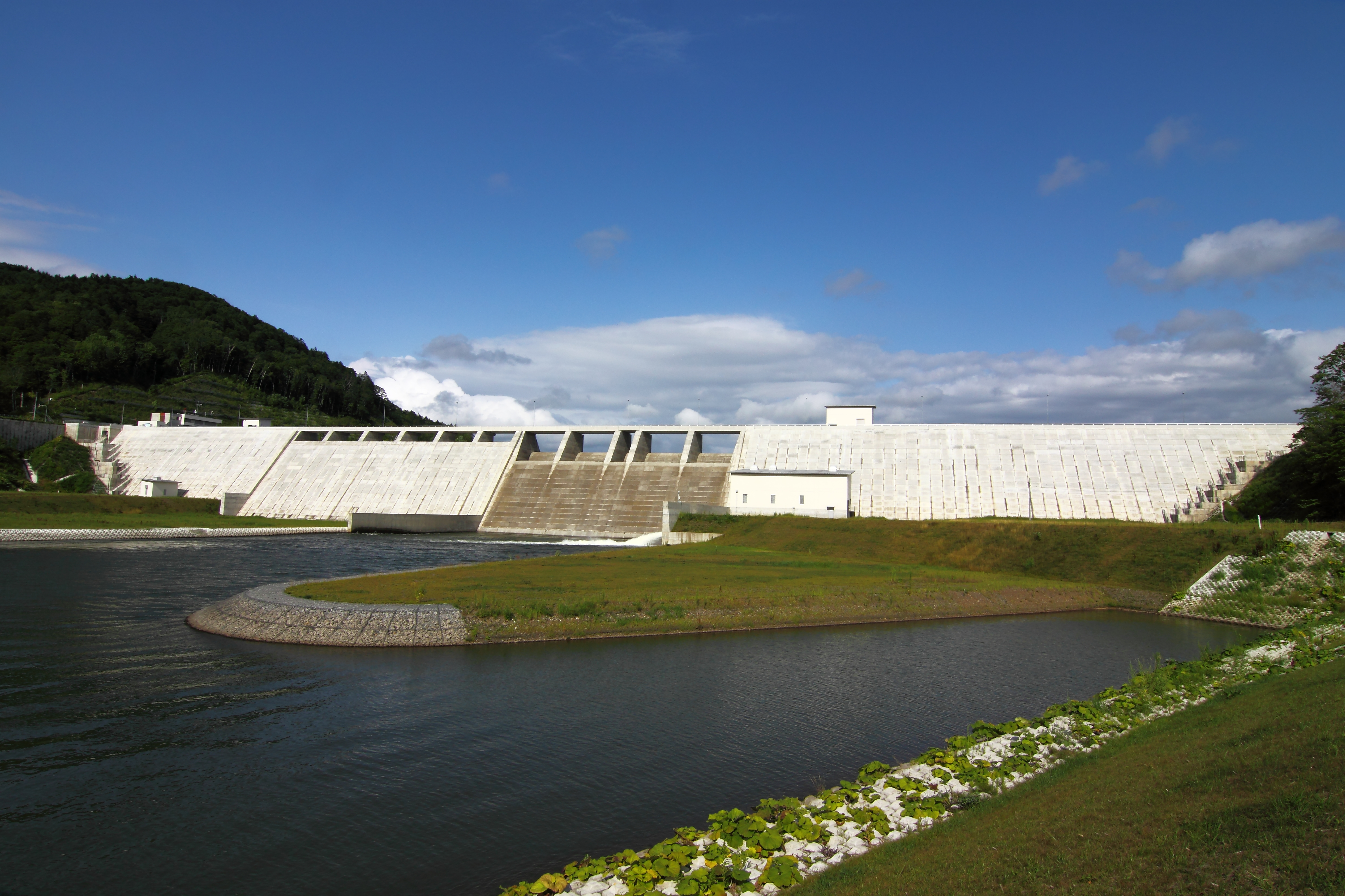 当別ダム。完工後の写真。